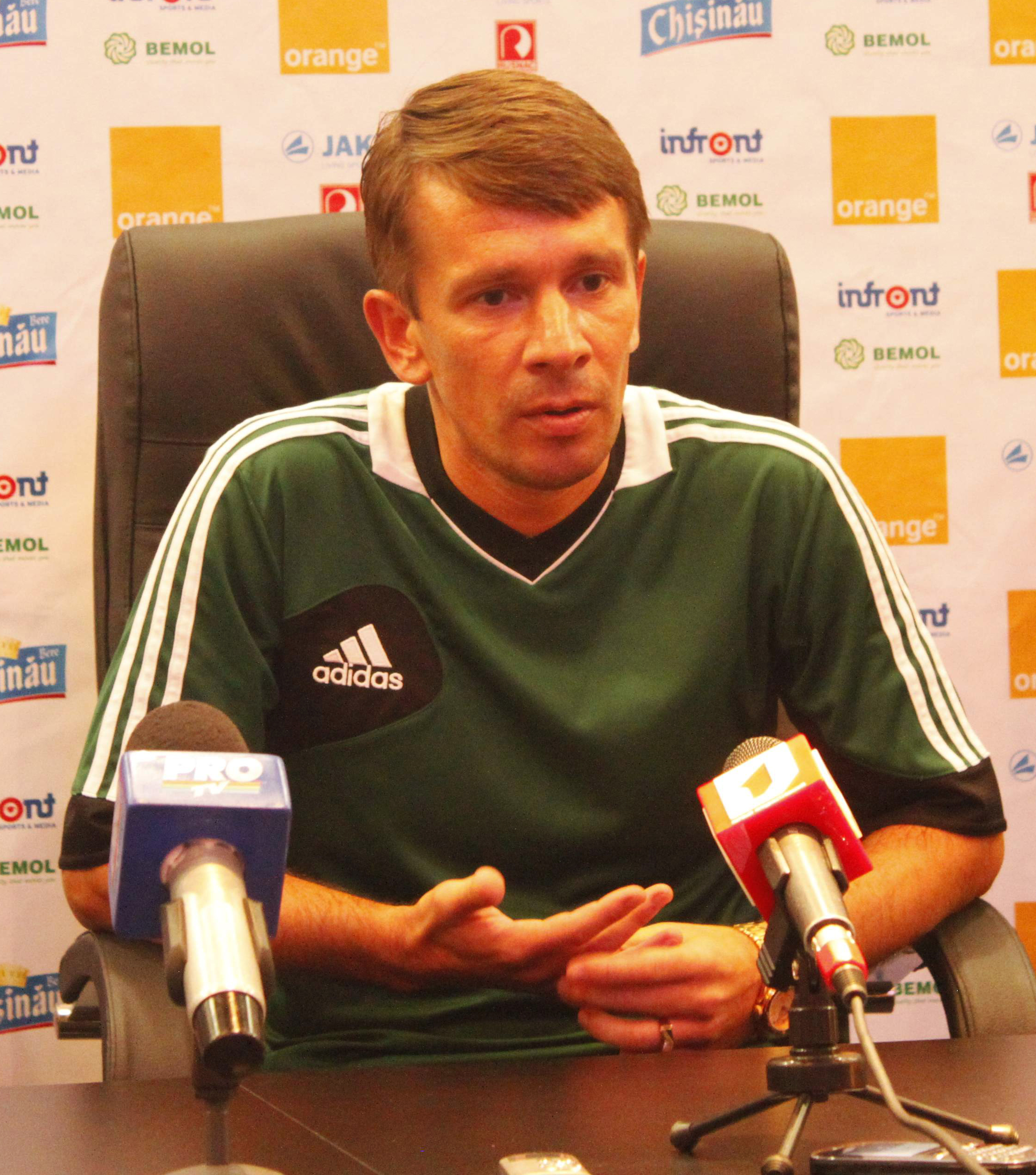 Владислав Иванович Гоян - главный тренер ФК Тирасполь